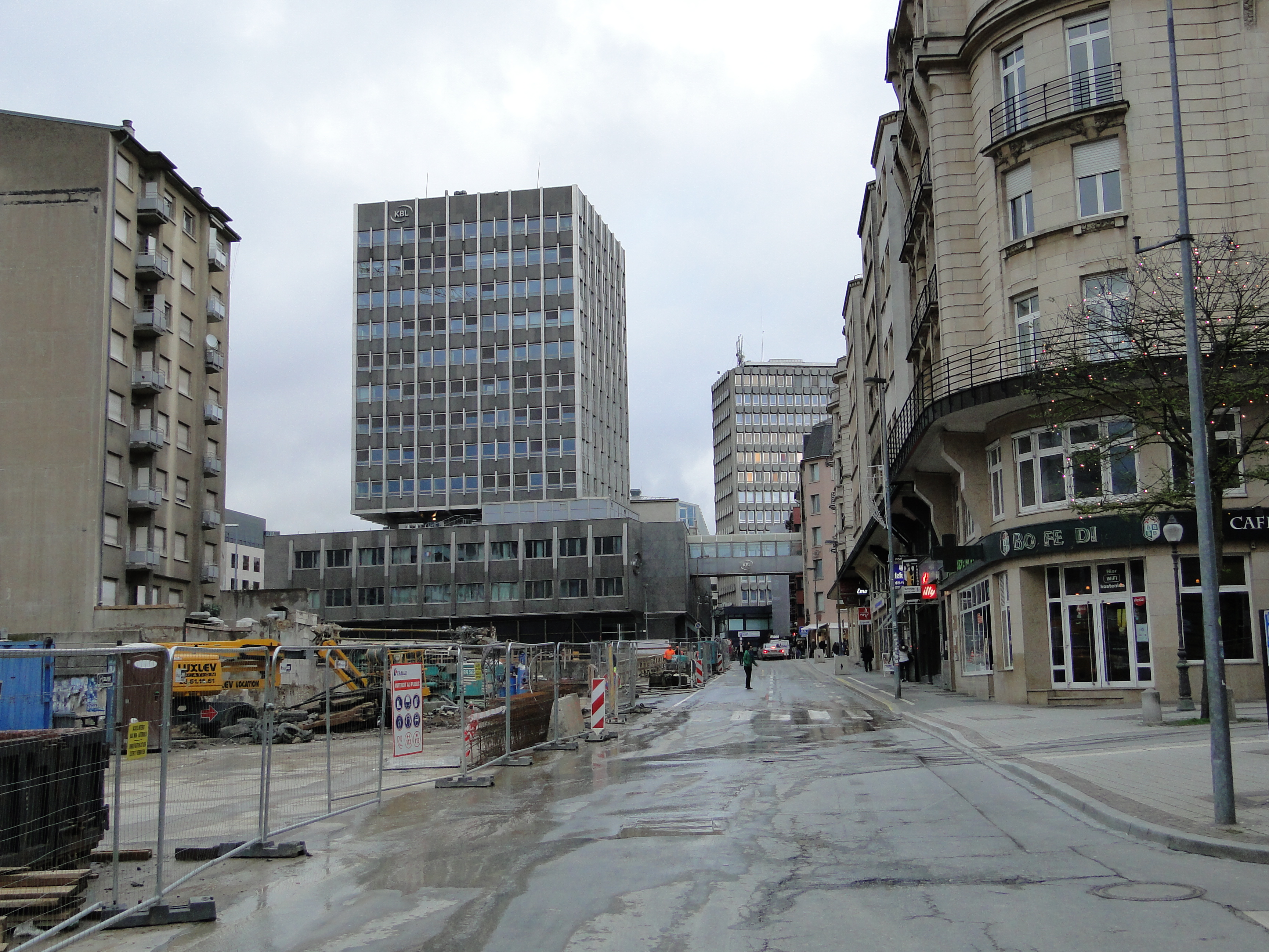 Luxembourg, rue Aldringen. Pendant les travaux dans le cadre du chantier "Royal-Hamilius"